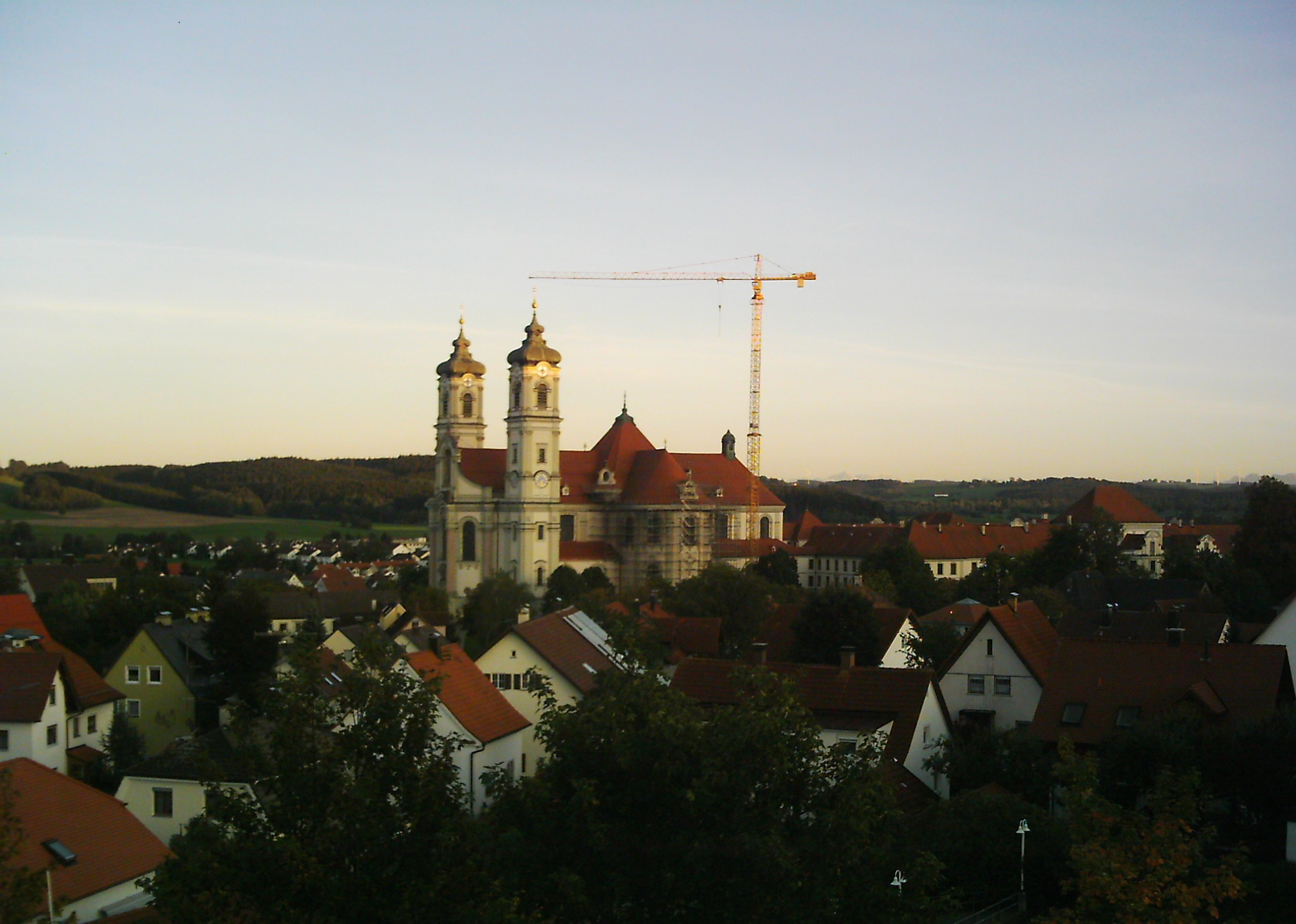 Basilica Minor St. Alexander und St. Theodor der ehem. Reichsabtei Ottobeuren, Landkreis Unterallgäu, Bayern, Deutschland.